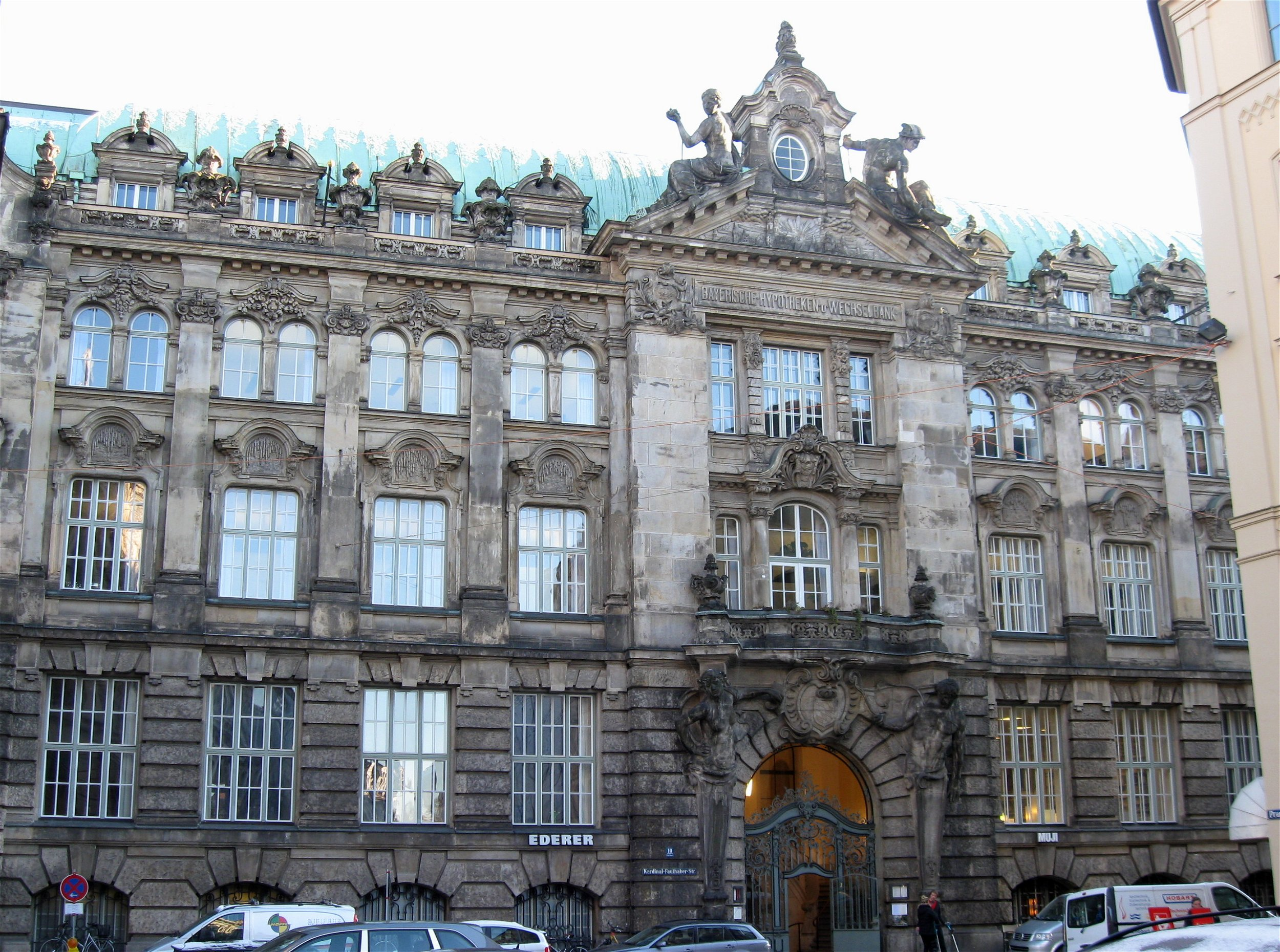 Kardinal-Faulhaber-Straße 10; (Hypo-Vereinsbank), Westflügel, monumentaler Neubarockbau, 1895-96 von Emil Schmidt, mit reichem plastischem Schmuck von Hugo Kaufmann